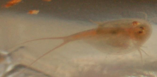 listonoh obrázek listonoha